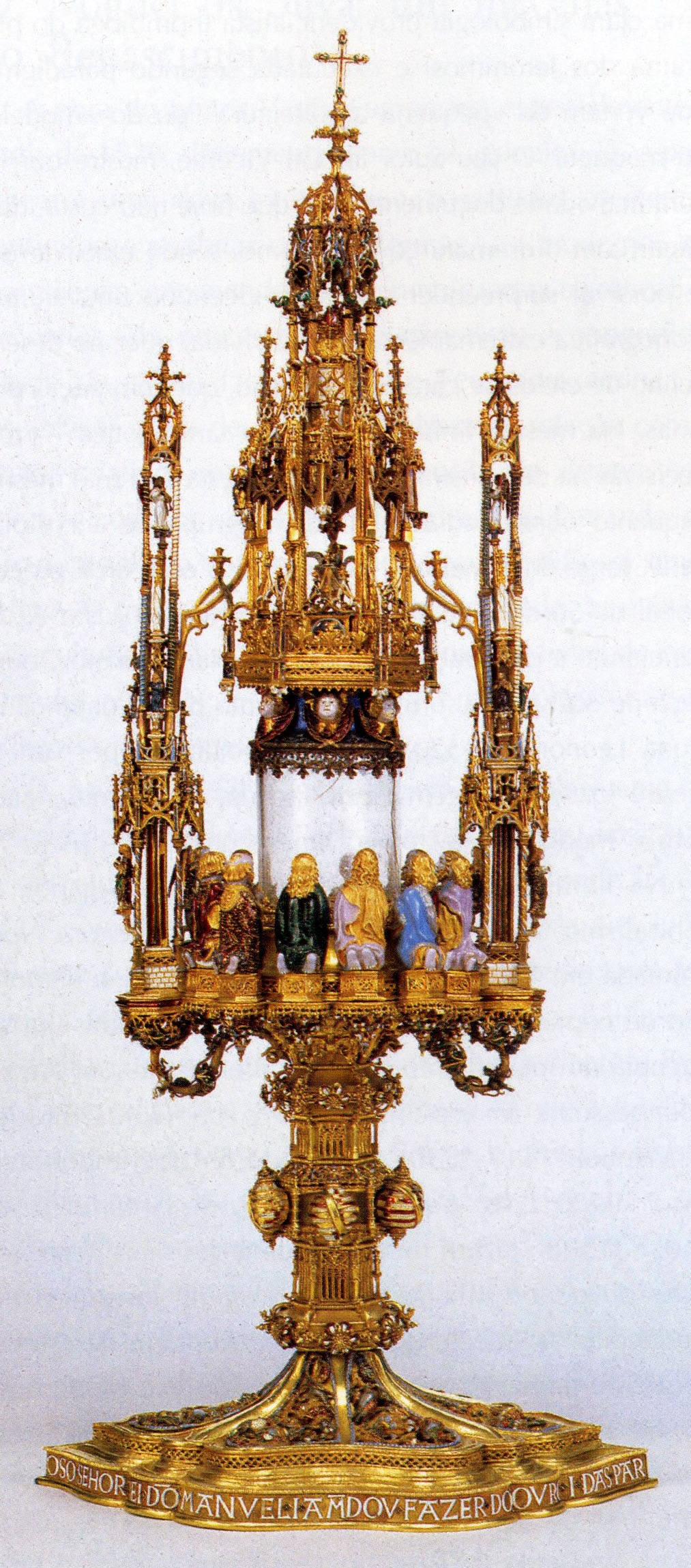 Ostensoir de Belem, de Gil Vicente